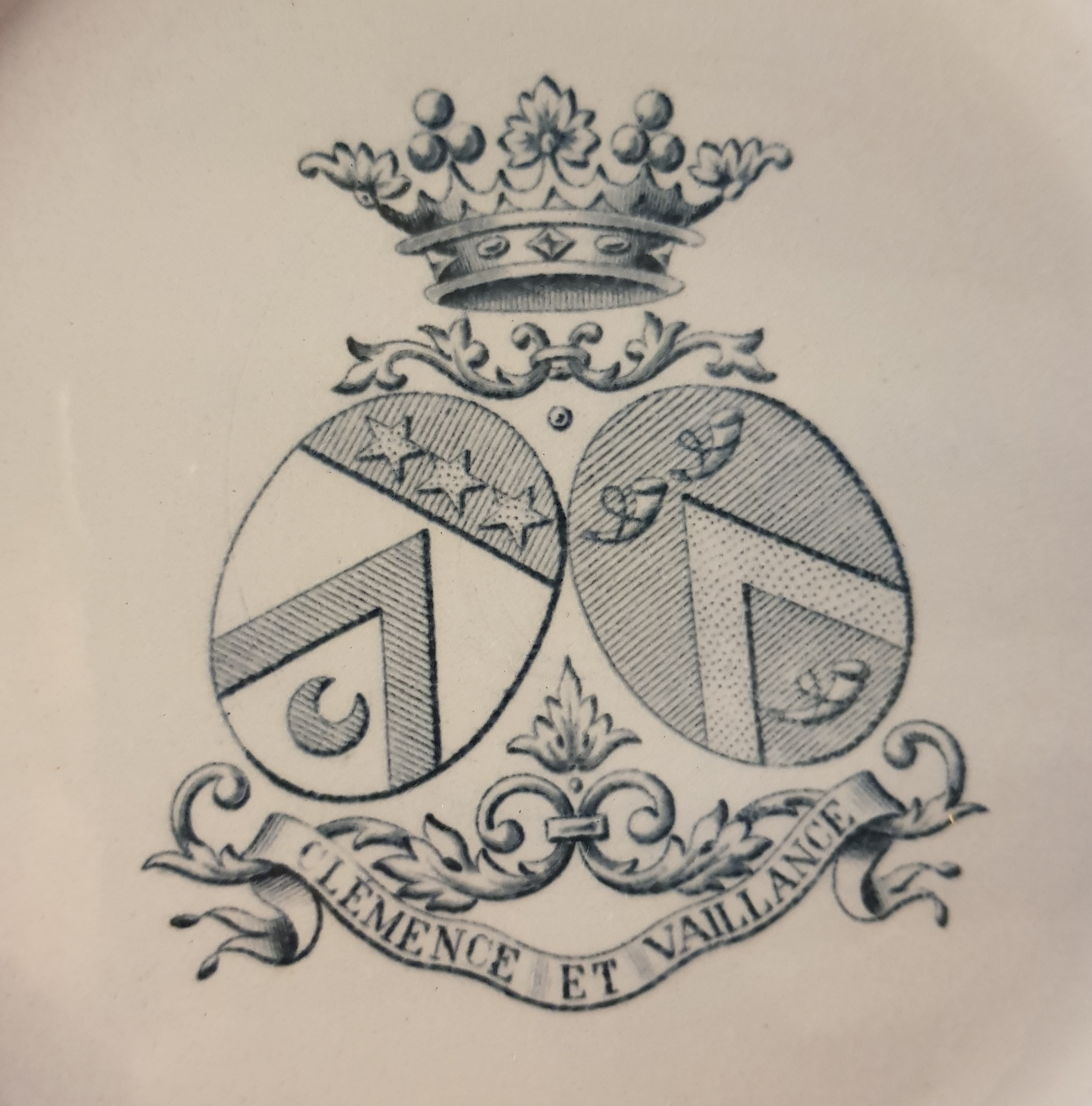 Ces blasons figurent sur le service de table ayant servi au Mariage de Melle Darodes de Tailly avec Mr Saguez de Breuvery